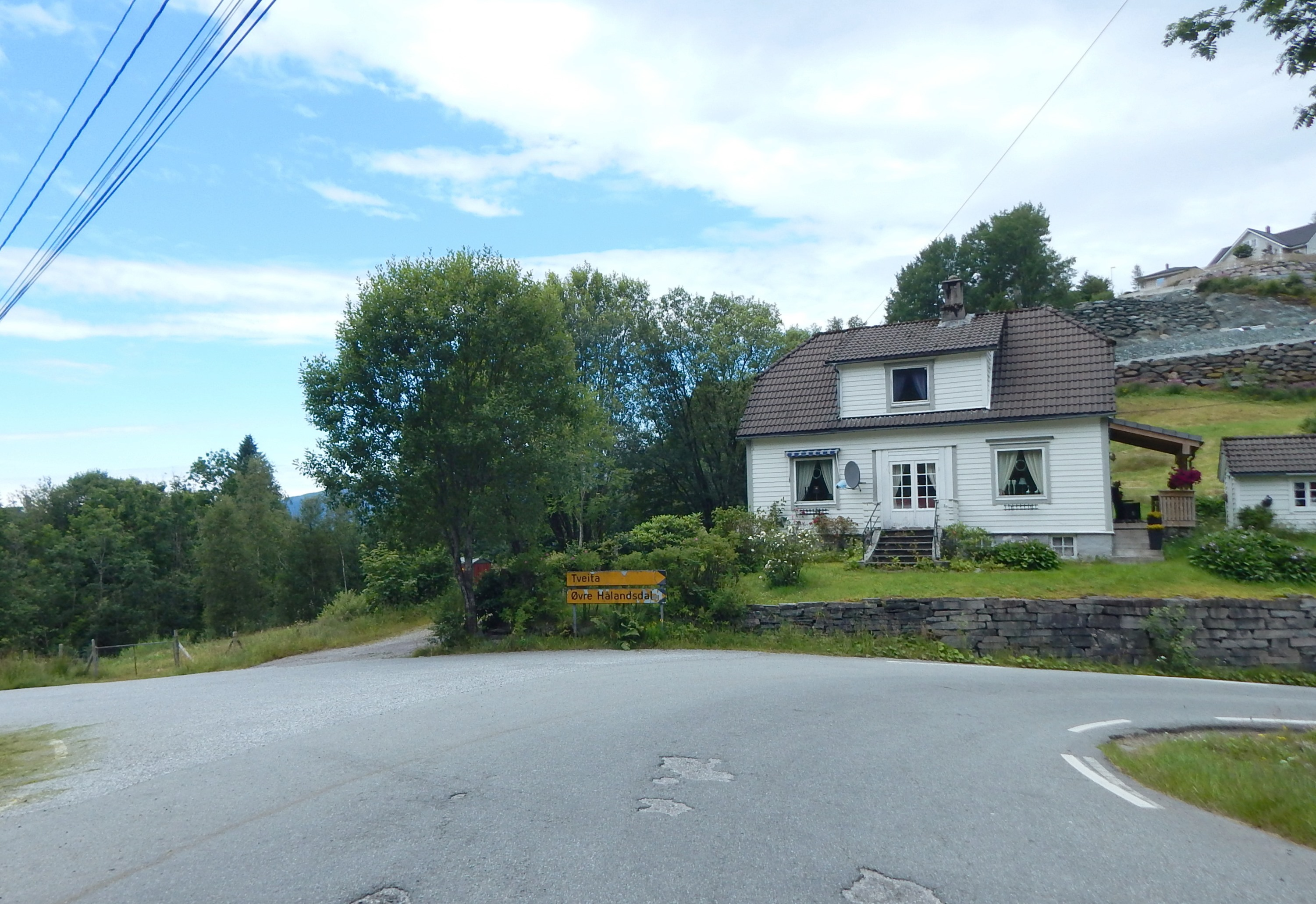 Fylkesvei 123 svinger til høyre på Holdhusvegen mot Holdhus kirke.